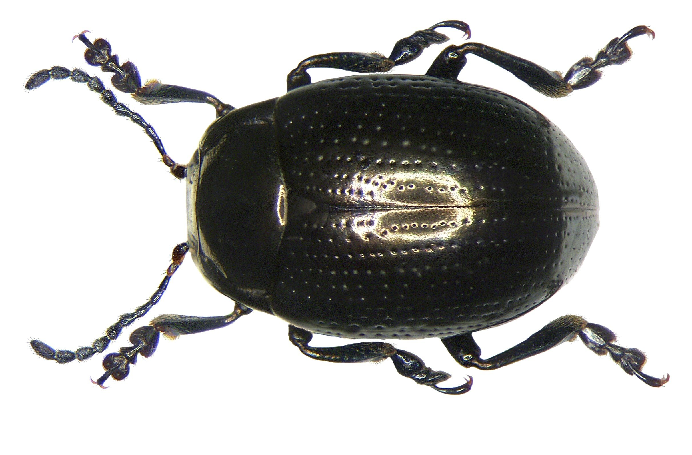 Chrysolina oricalcia (Mueller, 1776) Familie: Chrysomelidae Grösse: 6.5-8,5 mm Verbreitung: Europa Ökologie: an Anthriscus silvestris, Chaerophyllum aureum, Aegopodium podagraria und Populus nigra Fundort: Germania, Bayern, Oberfranken, Selbitz leg.det. U.Schmidt, 2007 Foto: U.Schmidt, 2007